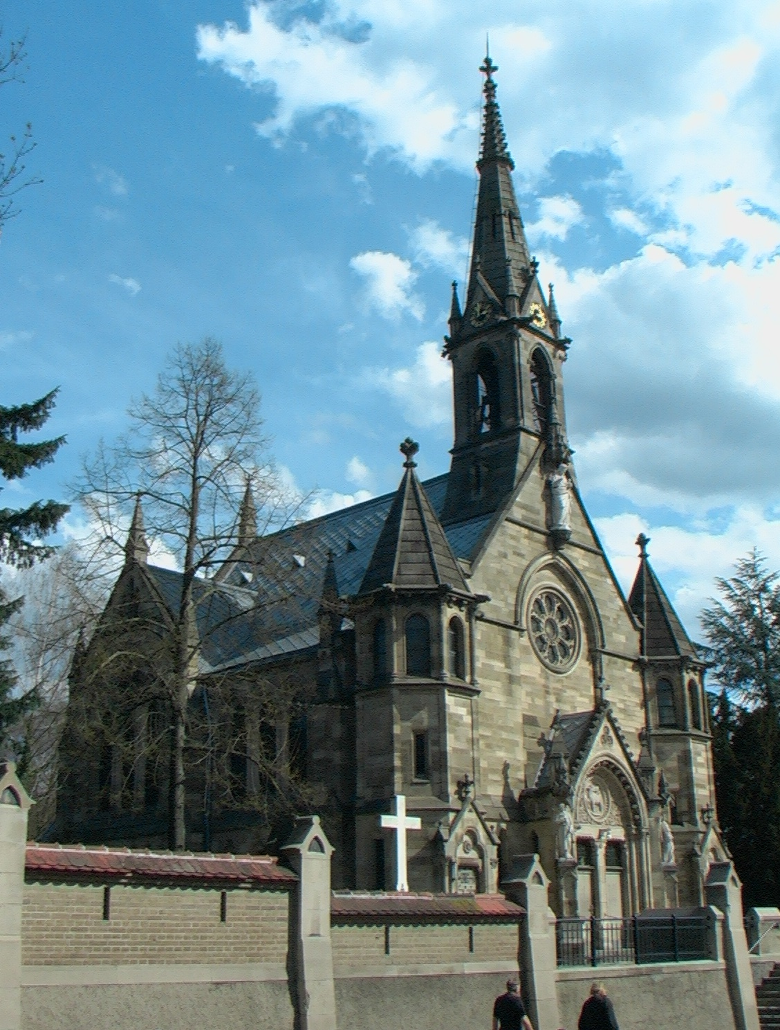 Die evangelische Katharinenkirche in Reutlingen wurde 1887-1891 nach den Plänen von Heinrich Dolmetsch auf dem Friedhof Unter den Linden mit einem neugotischen Innenraum erbaut.